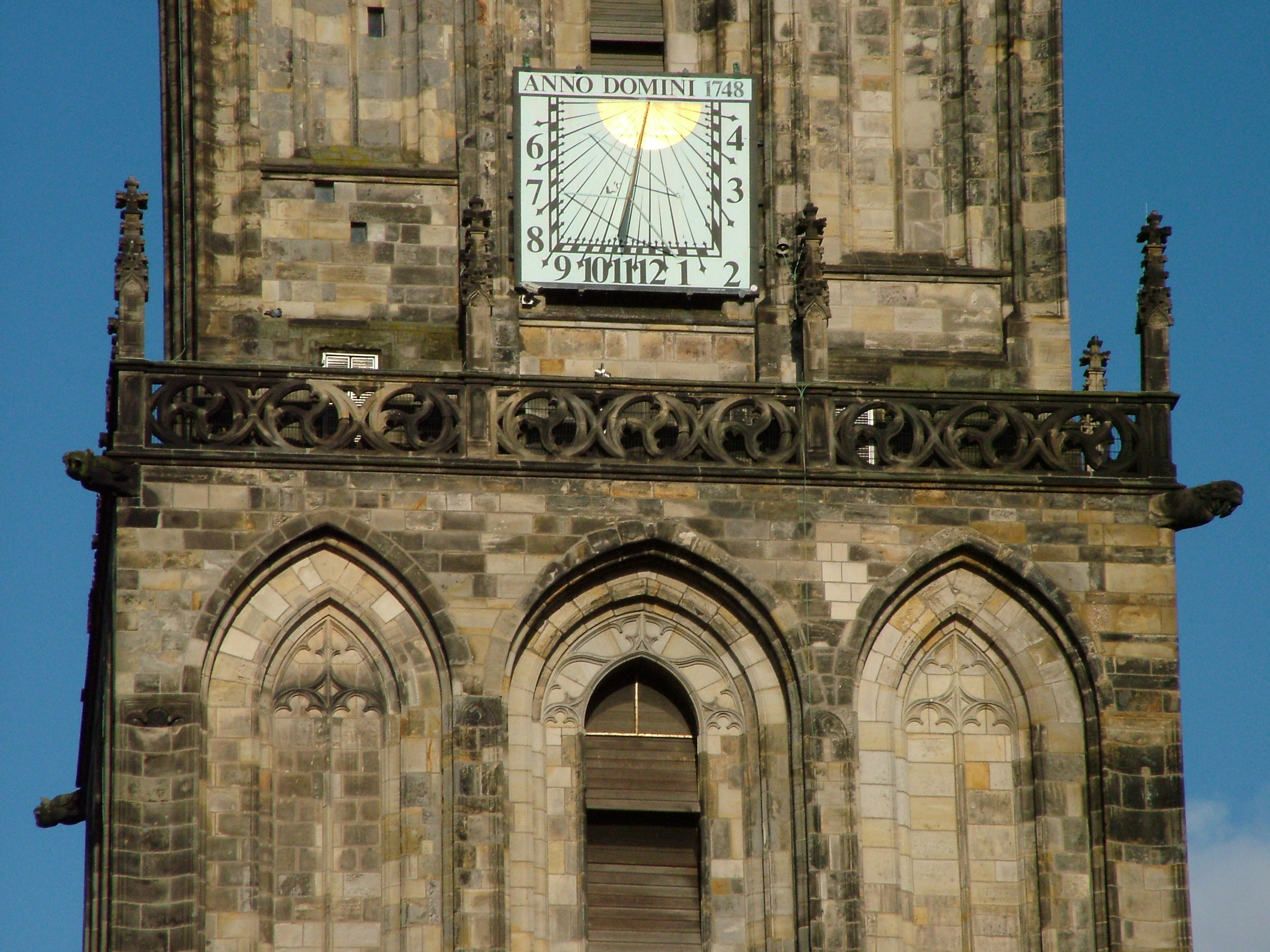 Martinitoren Groningen